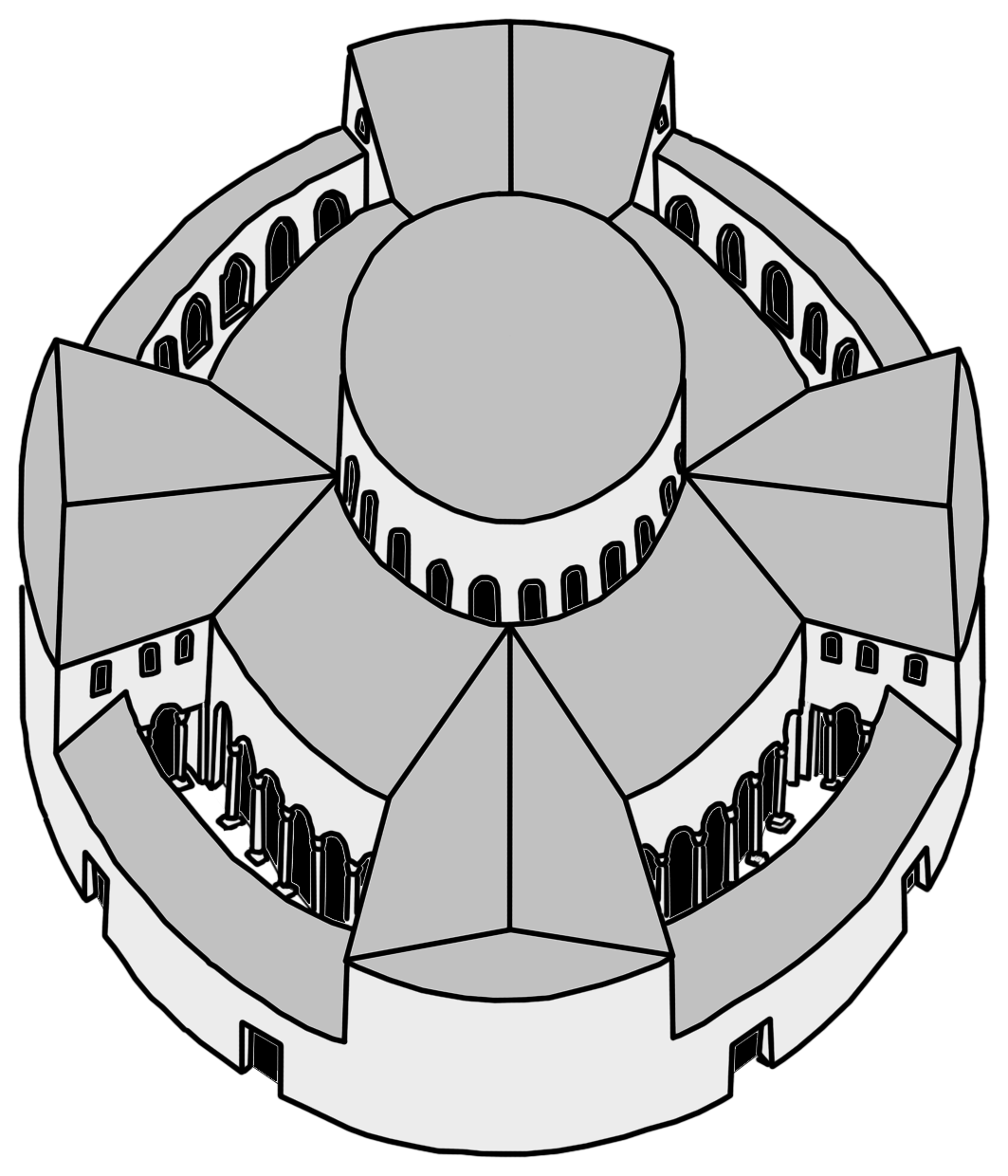 Schizzo ricostruttivo dell'aspetto esterno della chiesa di Santo Stefano Rotondo a Roma nel V secolo.